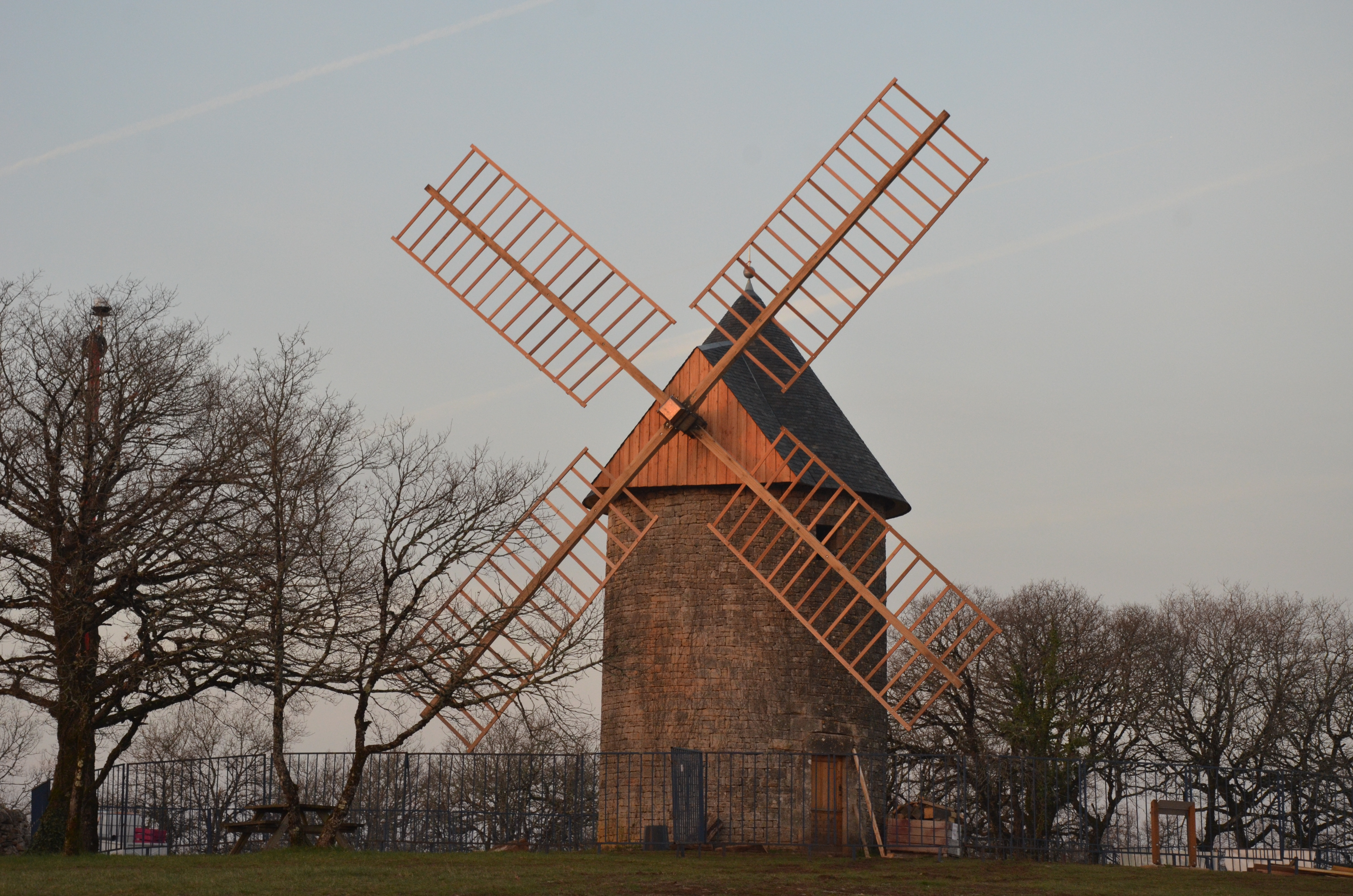 Moulin à vent de Gignac Lot réhabilité à l'identique en 2017 par l'association Lo Patrimòni et les Amis du Moulin de Gignac. Il fabrique de la farine lors des fêtes locales, pour les Journées européennes des moulins et du patrimoine meulier en mai, pour les Journées du Patrimoine de Pays et des Moulins en juin et pour les Les Journées du Patrimoine en septembre.